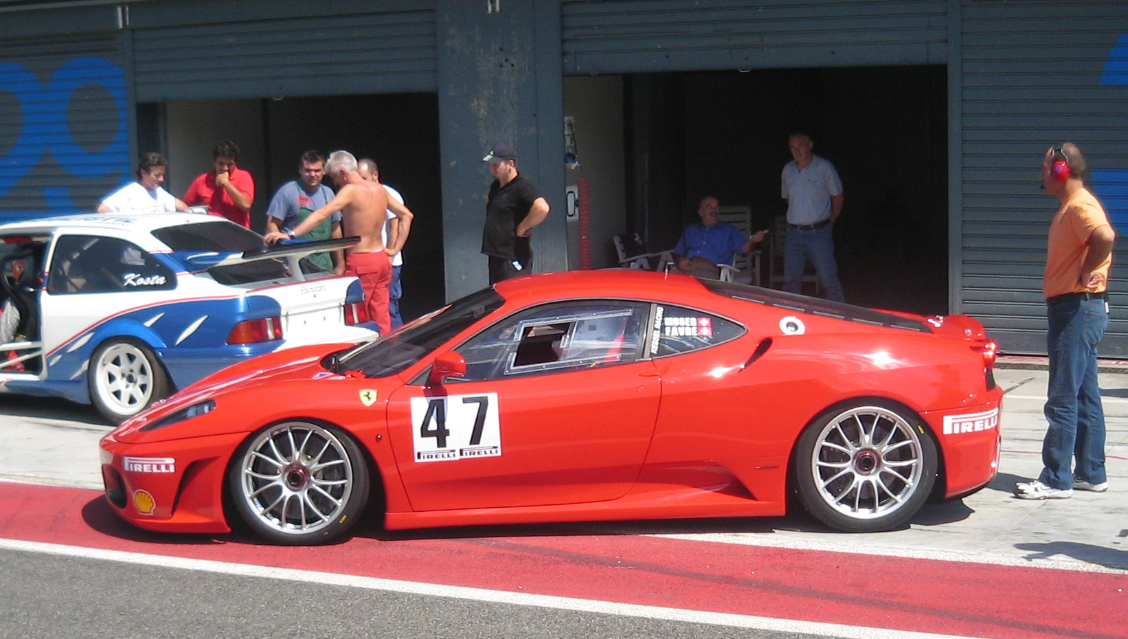 Ferrari F430 at Monza